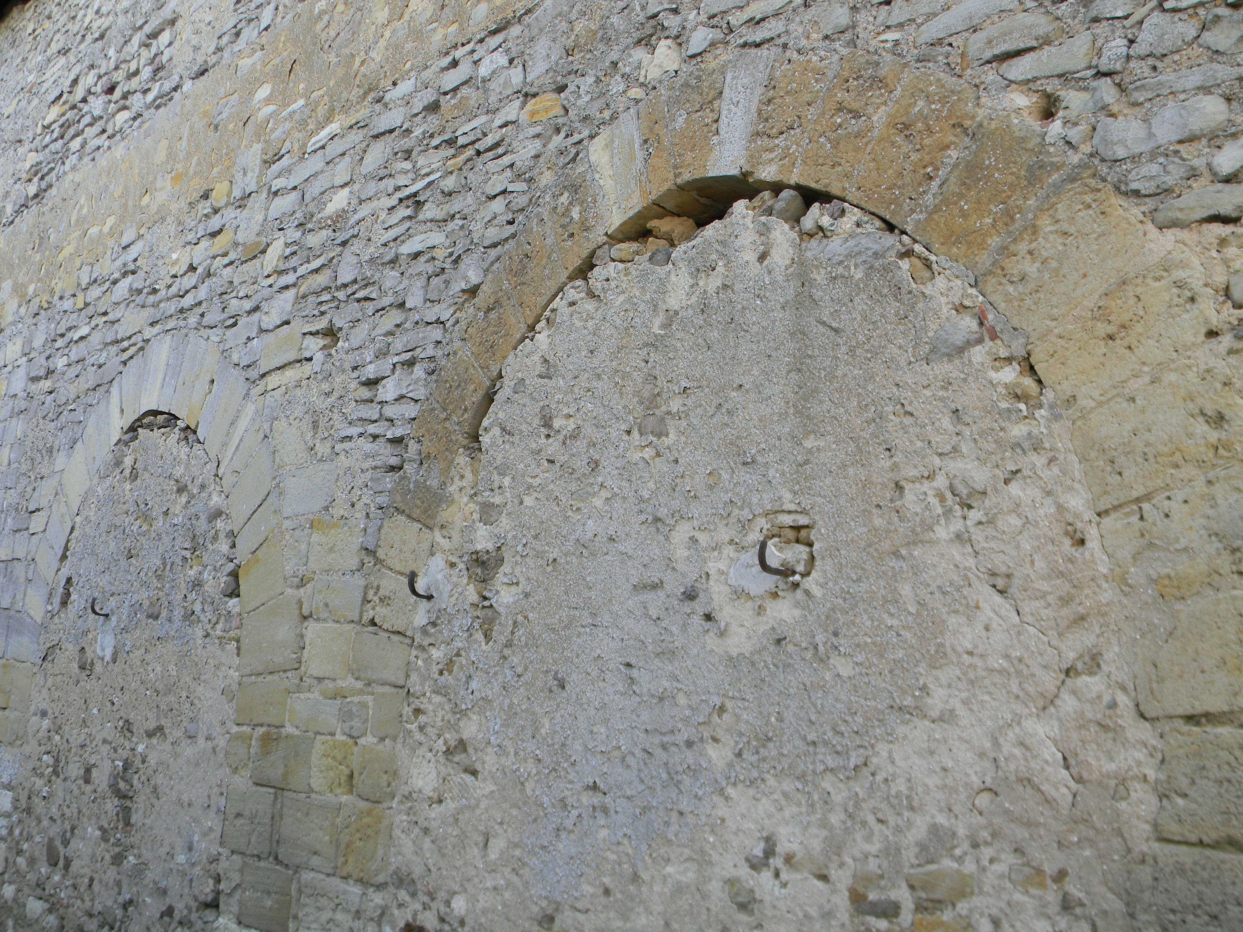 Le mur nord de la nef de l'église Notre Dame de Brissarthe. Deux des six arcades murées qui devaient donner sur une galerie aujourd'hui disparue.